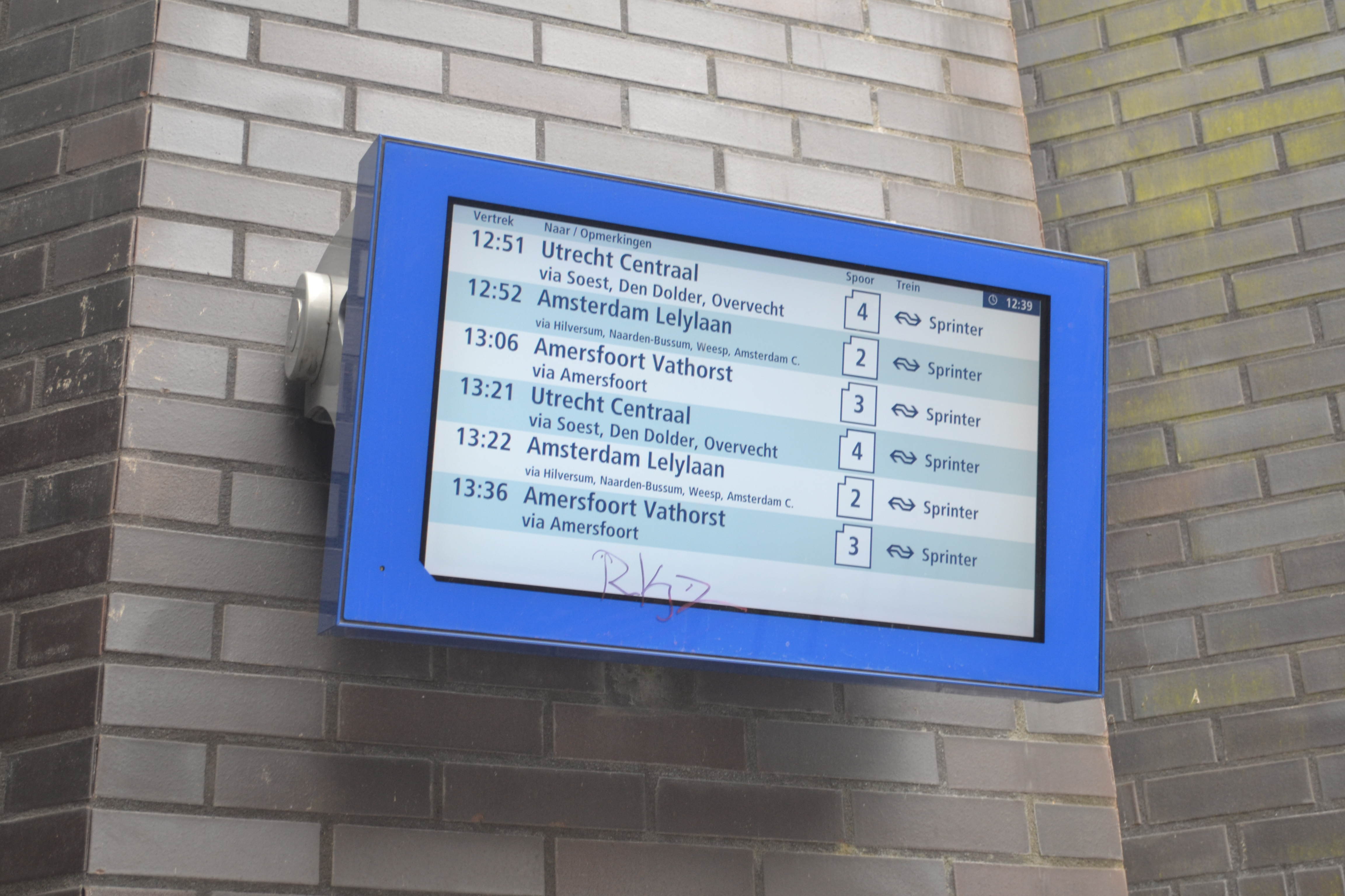 Een TB7-scherm op het station van Baarn